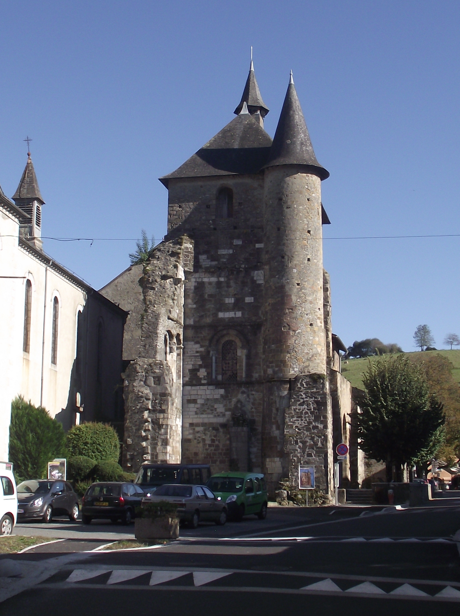 Église Saint-Pierre de Saint-Pé-de-Bigorre (Hautes-Pyrénées, France)